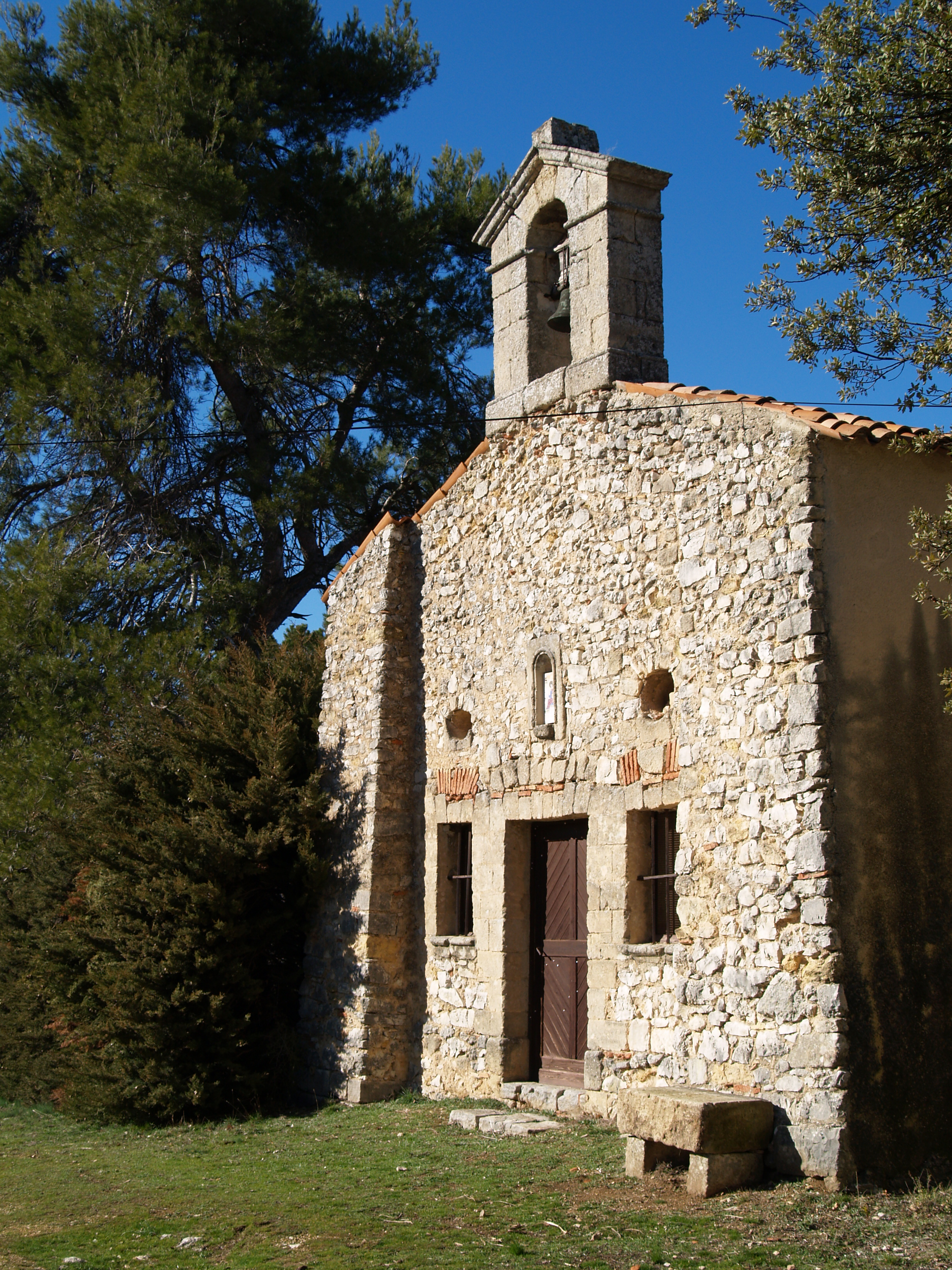 Chapelle Saint-Marc - La bastide des jourdans